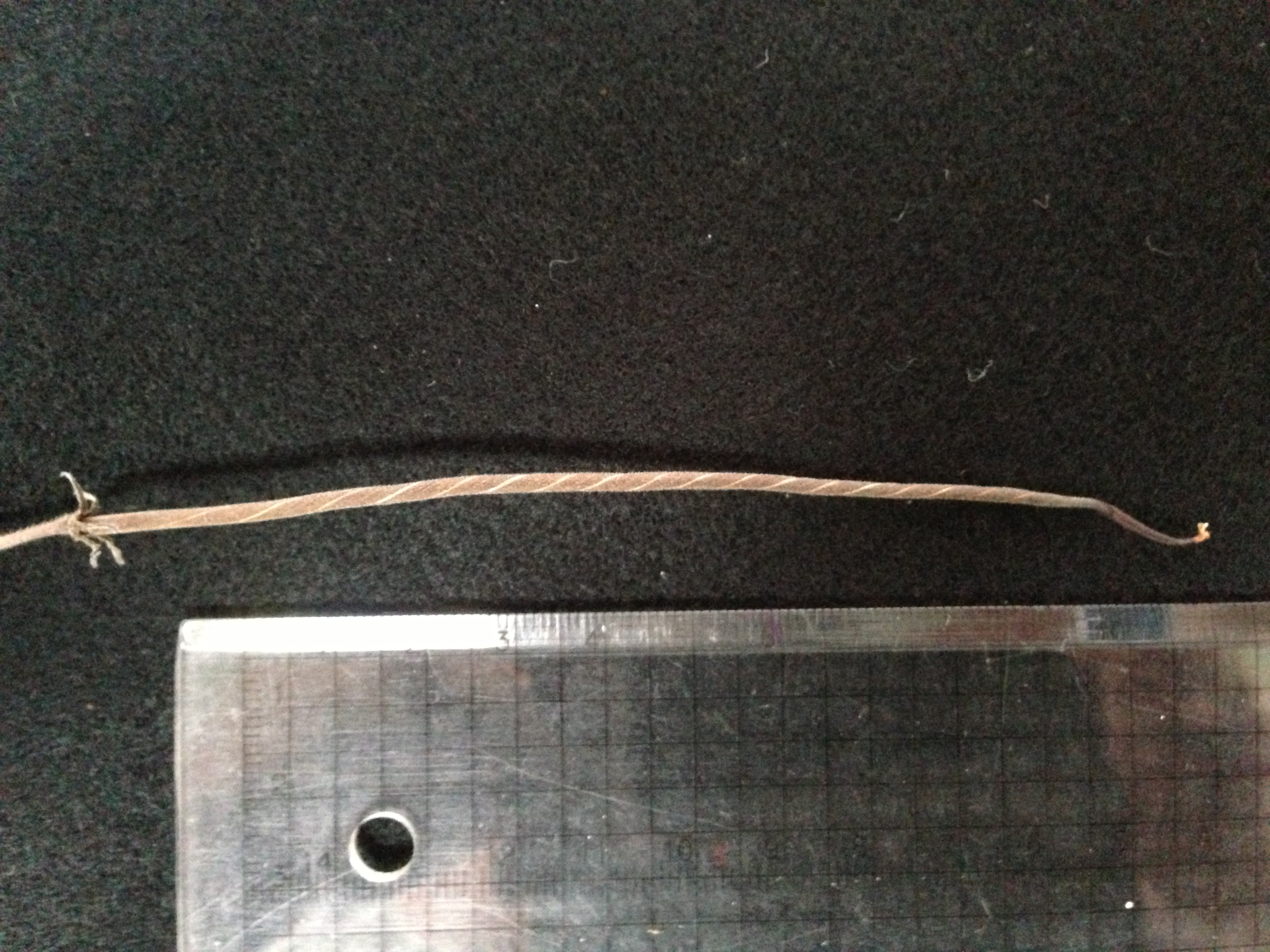 旋果苣苔果實1